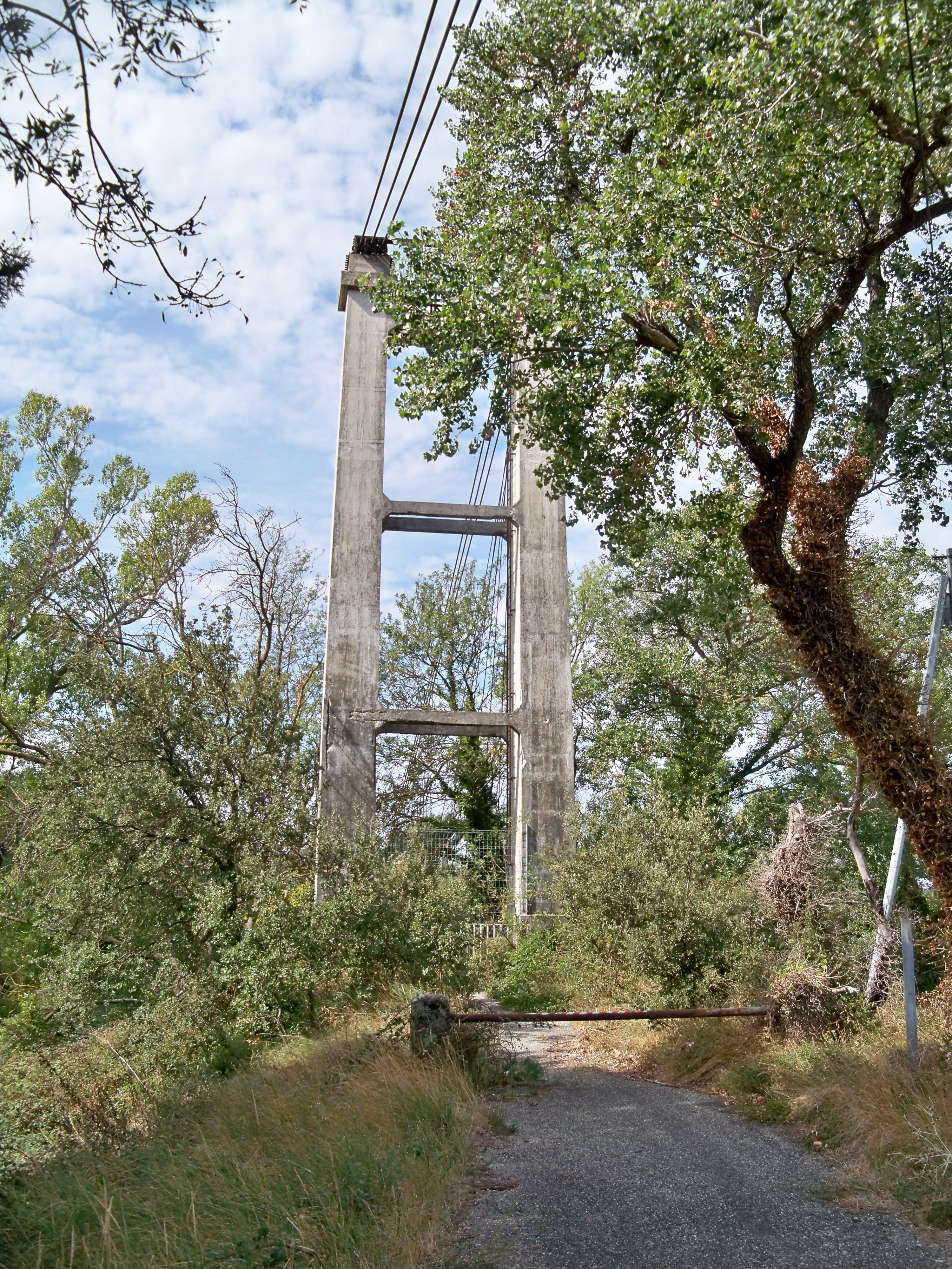 Pont suspendu situé sur le bras du Rhône dit bras des Arméniers en totalité, y compris les rampes d'accès et les massifs d'ancrage des câbles, à Sorgues (84) .